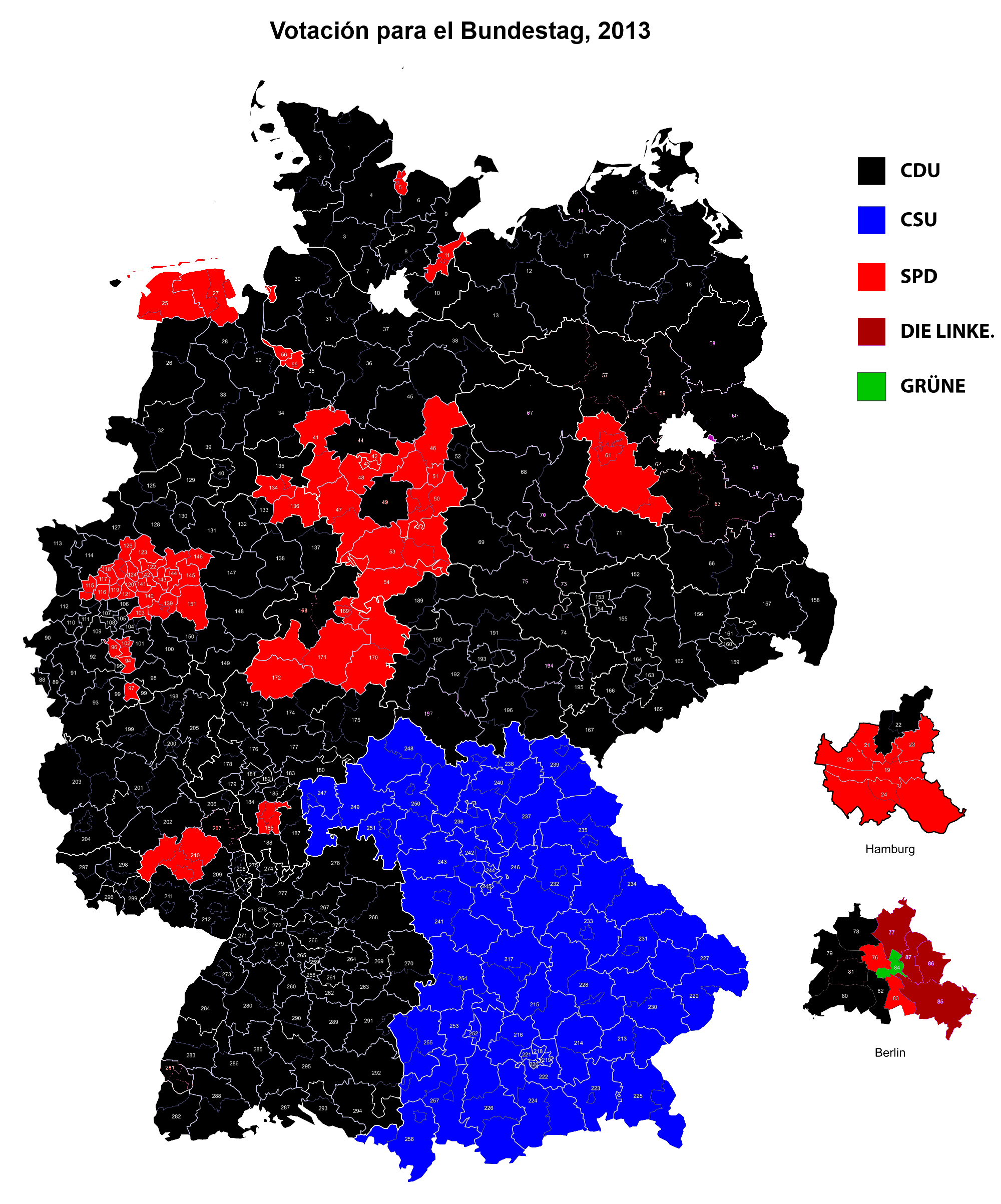 Mapa electoral de Alemania en .png del 2013